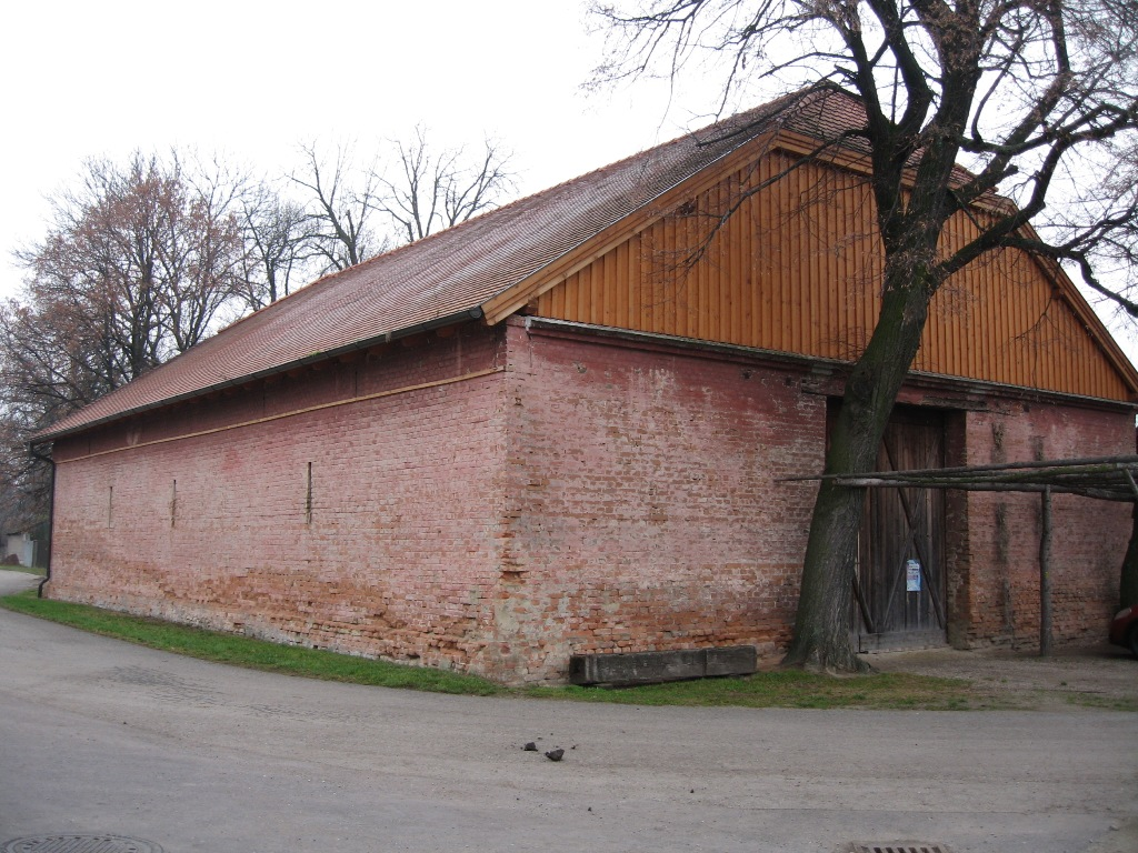 Außenaufnahme vom Bauernmuseum in Kalladorf